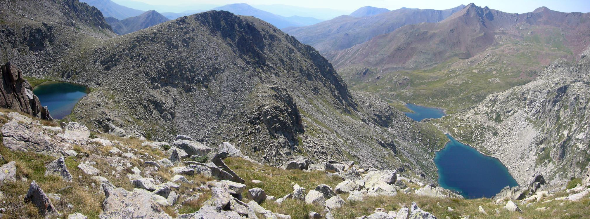 Estanys de Dalt, Rianegra i Francí; La Torre de Cabdella, Pallars Jussà, Catalunya